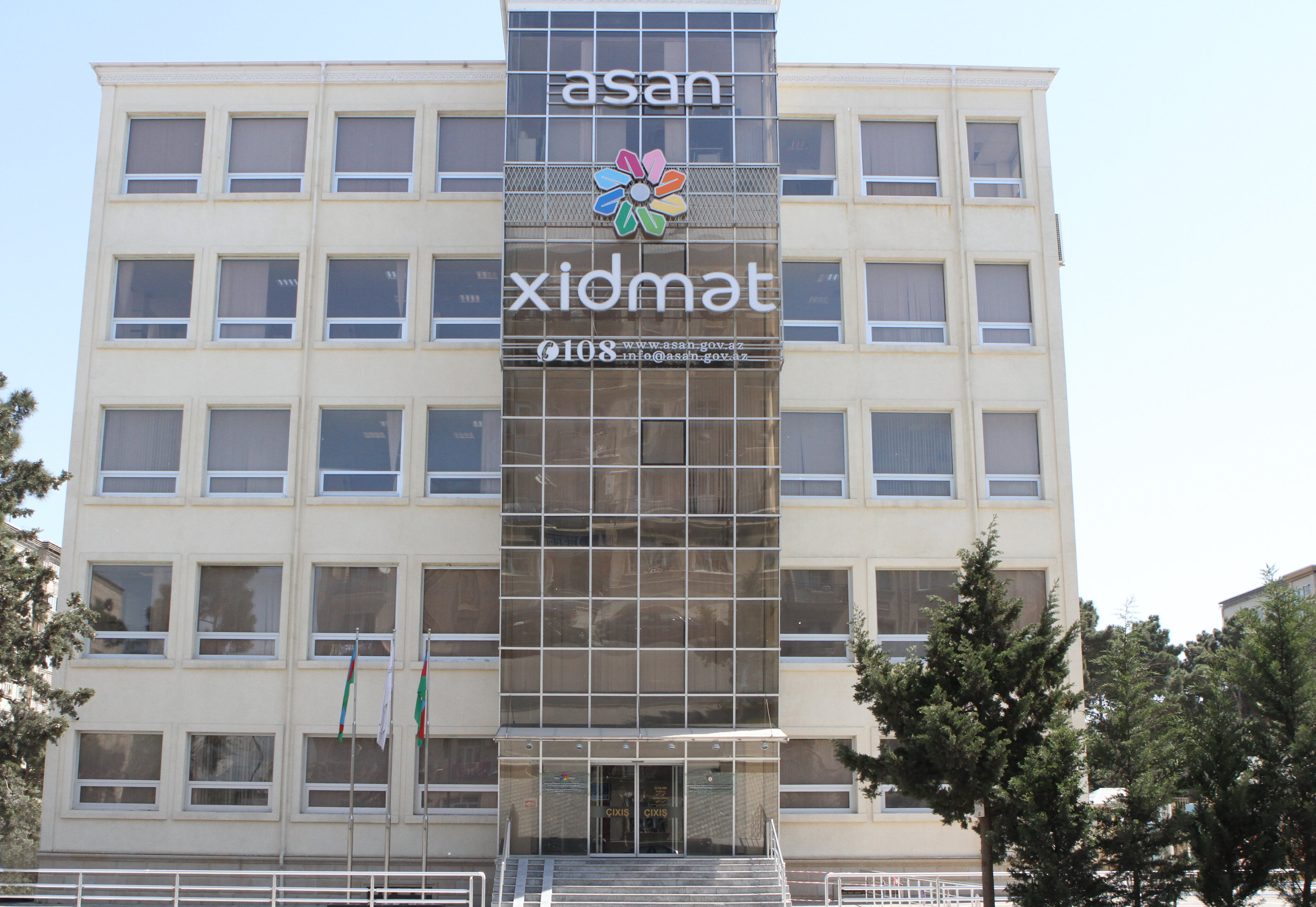 Bakıxanov (qəsəbə) 4 saylı ASAN Xidmət